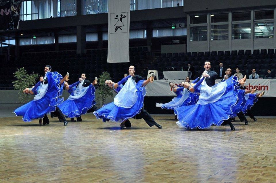 Dreamworld - Aufstieg in die 1. Bundesliga